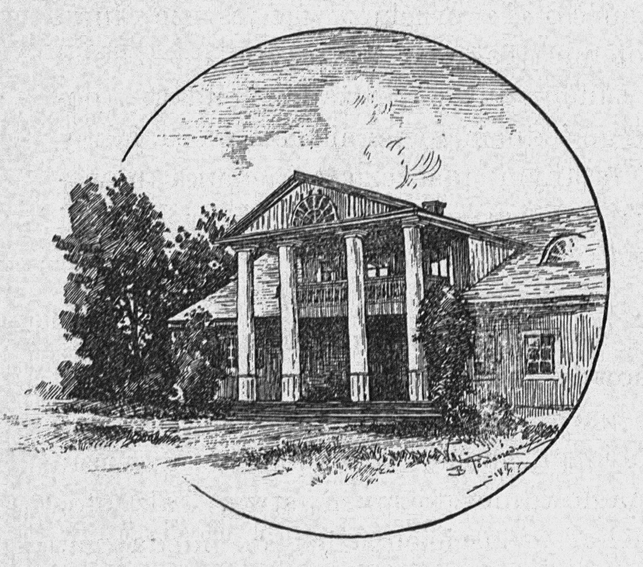 Беларуская (тарашкевіца): Налібакі (Nalibaki), сядзіба